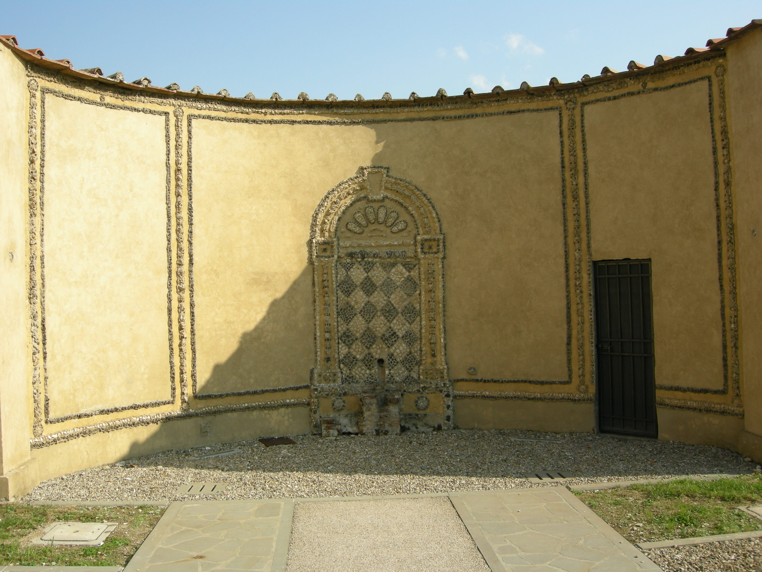 Castello dell'acciaiolo, giardino